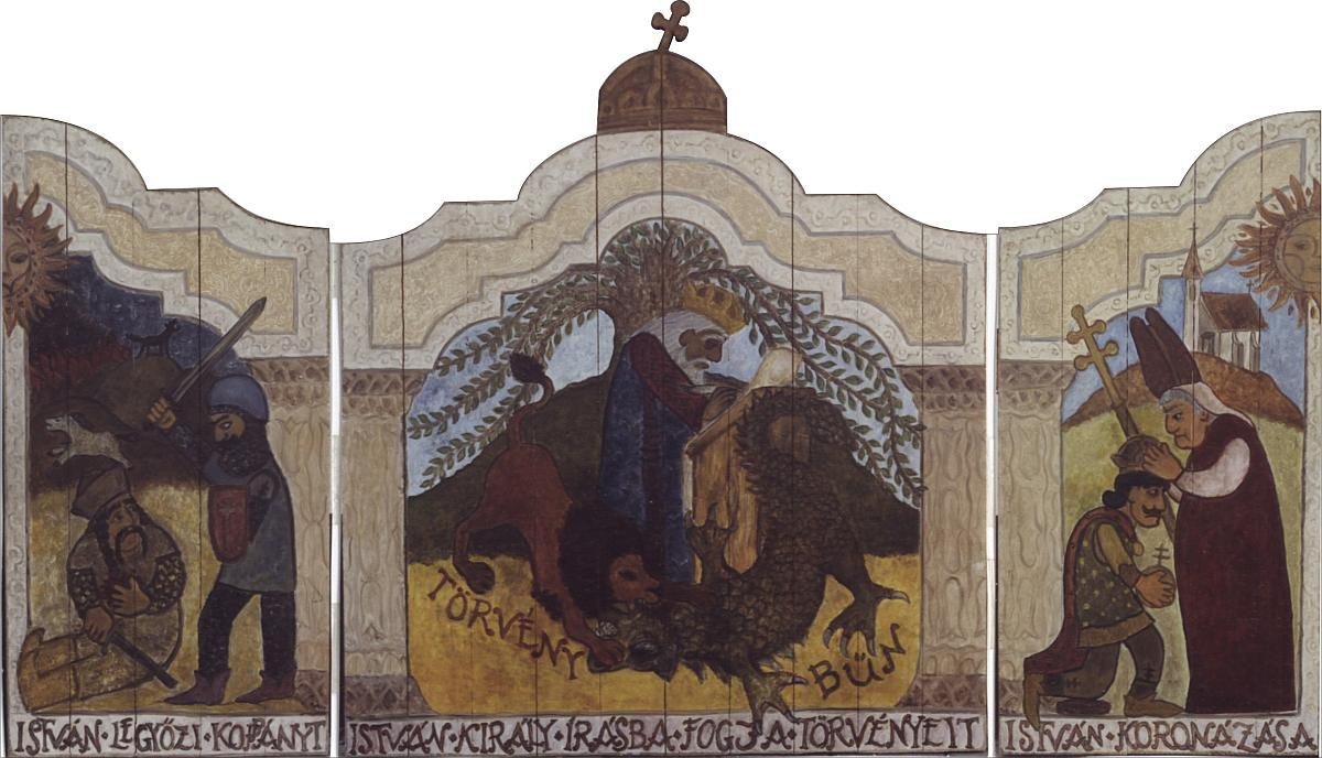 Szent István-triptichon Veresegyházon; olaj, fatábla, Joó Zoltán alkotása; kb. 230 x 130 cm